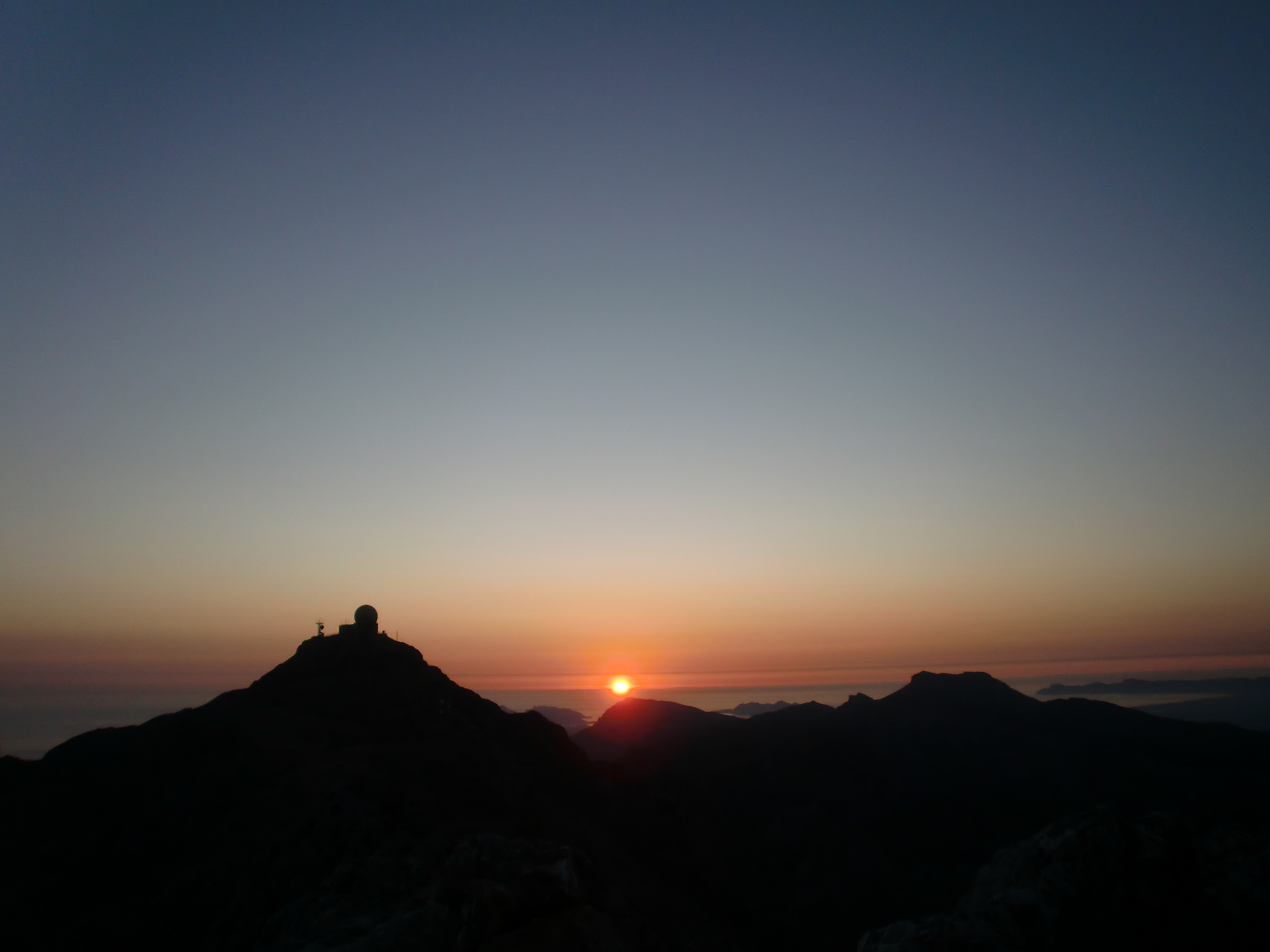 Puig Major visto desde el Penyal des Migdia.